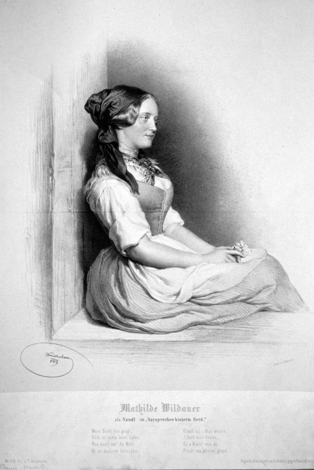 Mathilde Wildauer als Nandl in "Versprechen hinterm Herd", Lithographie von Josef Kriehuber, 1849